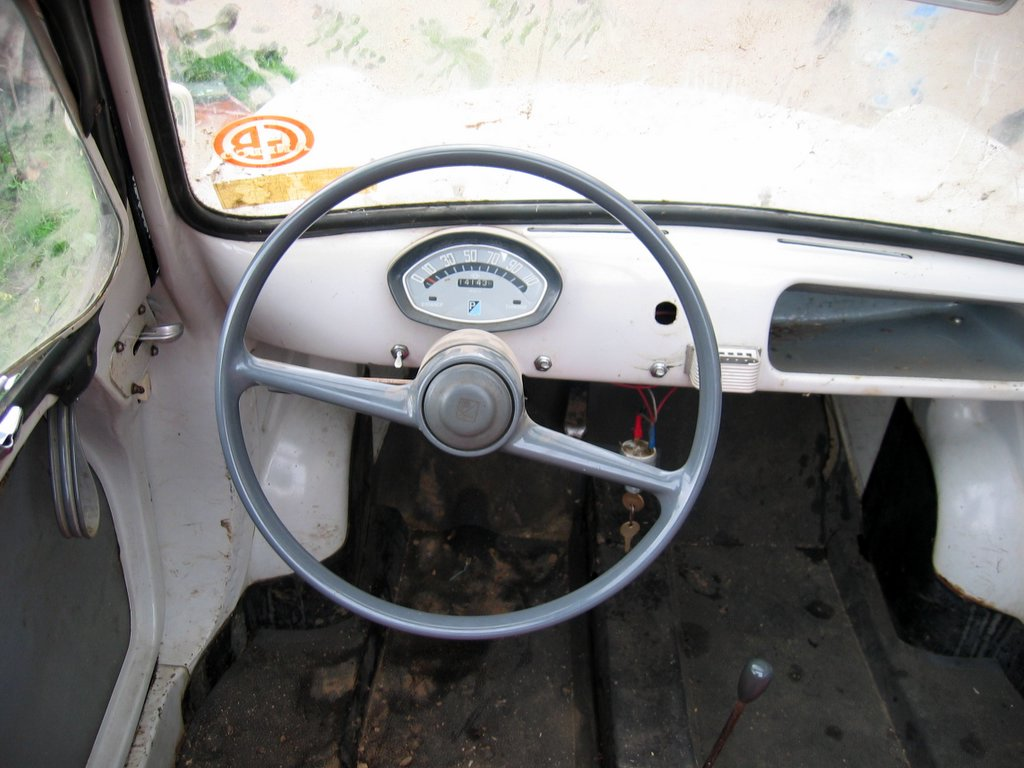 =Vespa 400 dashboard